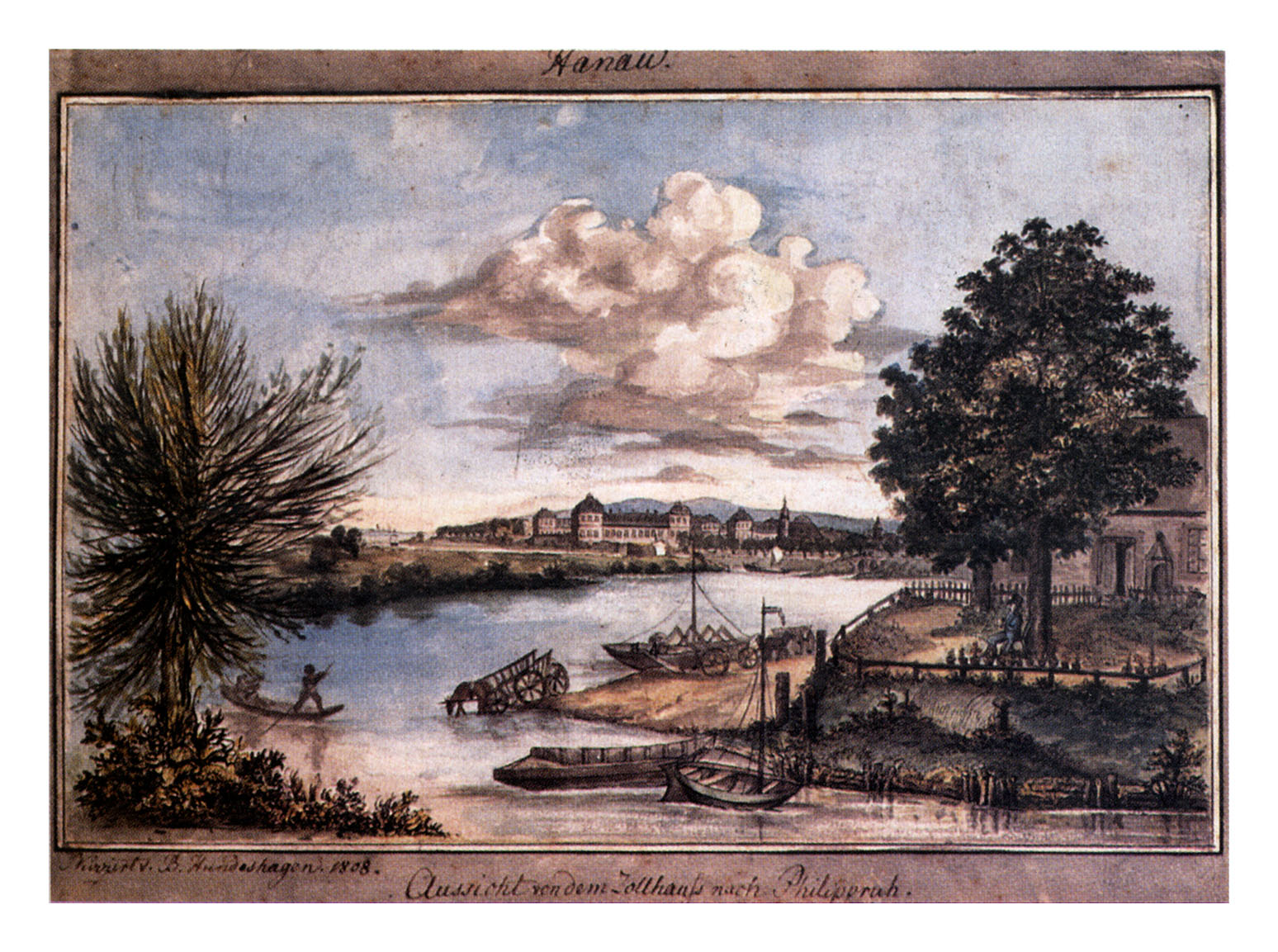 Blick von der Einfahrt zum Mainkanal nach Schloss Philippsruhe, 1808, bezeichnet Aussicht von dem Zollhaus nach Philippsruh.